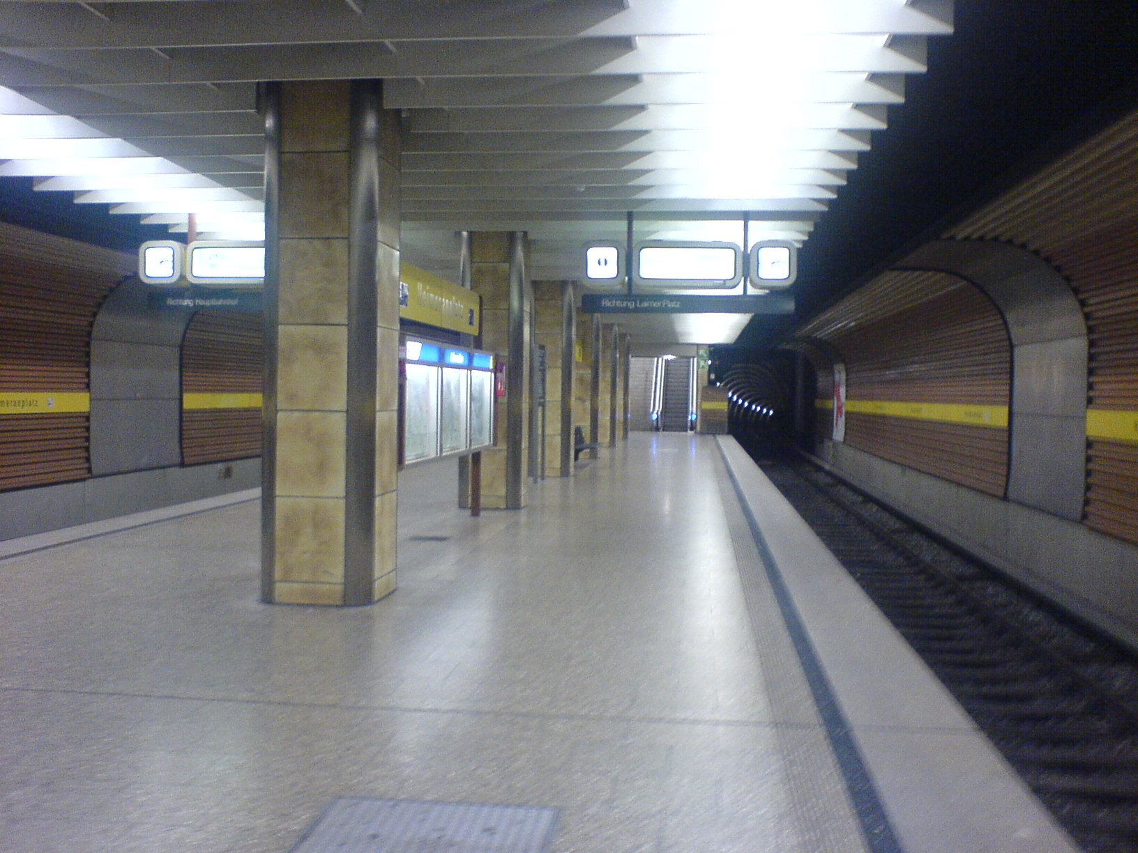 U-Bahn-Haltepunkt Heimeranplatz - Bahnsteig.